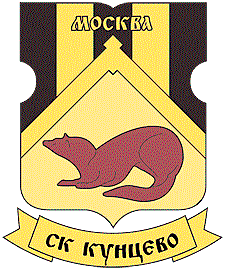 Кунцево